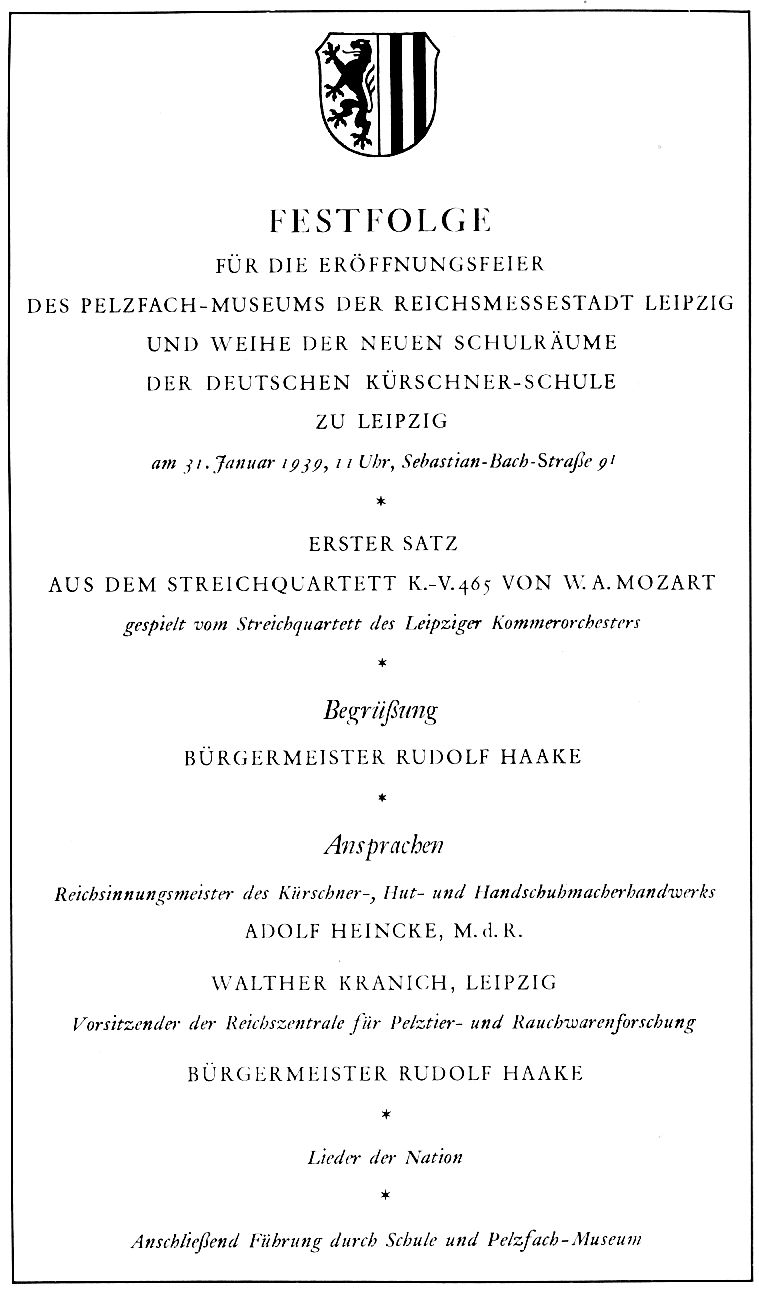 Festfolge für die Eröffnungsfeier des Pelzfach-Museums der Reichsmessestadt Leipzig und Weihe der neuen Schulräume der Deutschen Kürschnerschule zu Leipzig am 31. Januar 1939, 11 Uhr, Sebastian-Bach-Straße 9I.